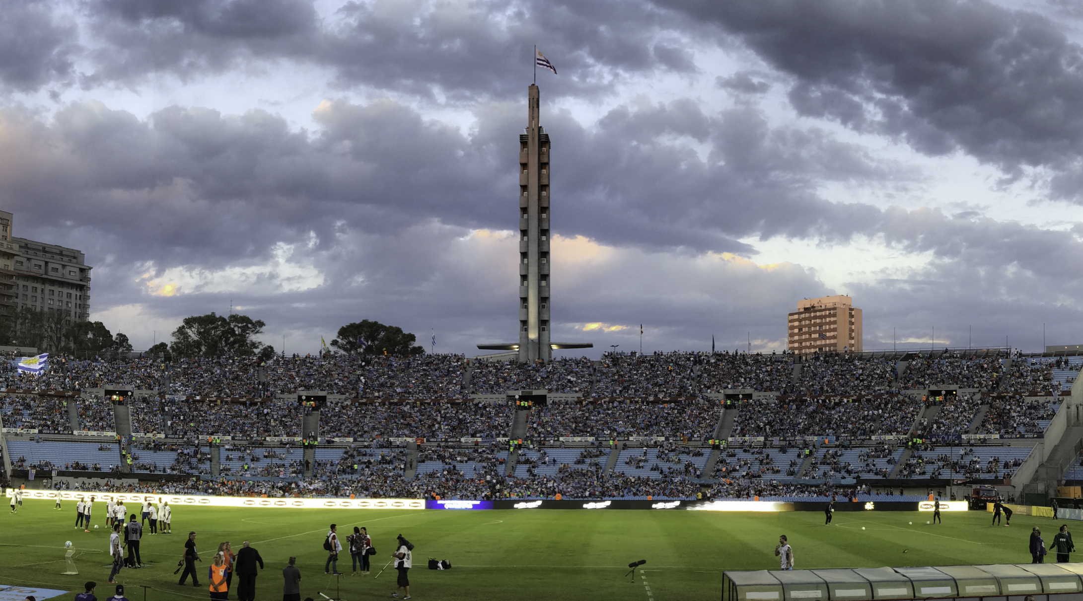 URUGUAY 2-1 ECUADOR Estadio: Centenario Árbitro: V. Carrillo (Perú). Asistentes: J. Bossio y C. Carrera (Perú). Cuarto árbitro: M. Santivañez (Perú). Uruguay: F. Muslera; M. Pereira, S. Coates, D. Godín, G. Silva; C. Sánchez (87' M. Corujo), E. Arévalo Ríos, M. Vecino, C. Stuani; D. Rolan (61' G. Ramírez) y L. Suárez. DT: O. W. Tabárez. Ecuador: E. Dreer; J. Paredes, G. Achilier, F. Erazo, W. Ayoví; J. Orejuela (82' J. Ayoví), C. Noboa; R. Ibarra, F. Martínez; M. Bolaños (72' J. Cazares); y F, Caicedo. DT: G. Quinteros. Goles: 12' Coates (U), 44' Caicedo (E) y 45 Rolan (U) Amarillas: Arévalo Ríos (U). Martínez y Orejuela (E) Camera: Lens: Focal Length: Exposure: ISO